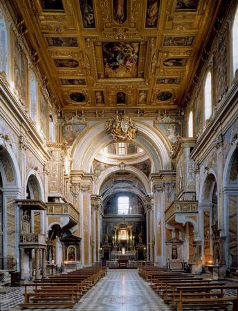 Interno, chiesa di Santa Maria La Nova, Napoli